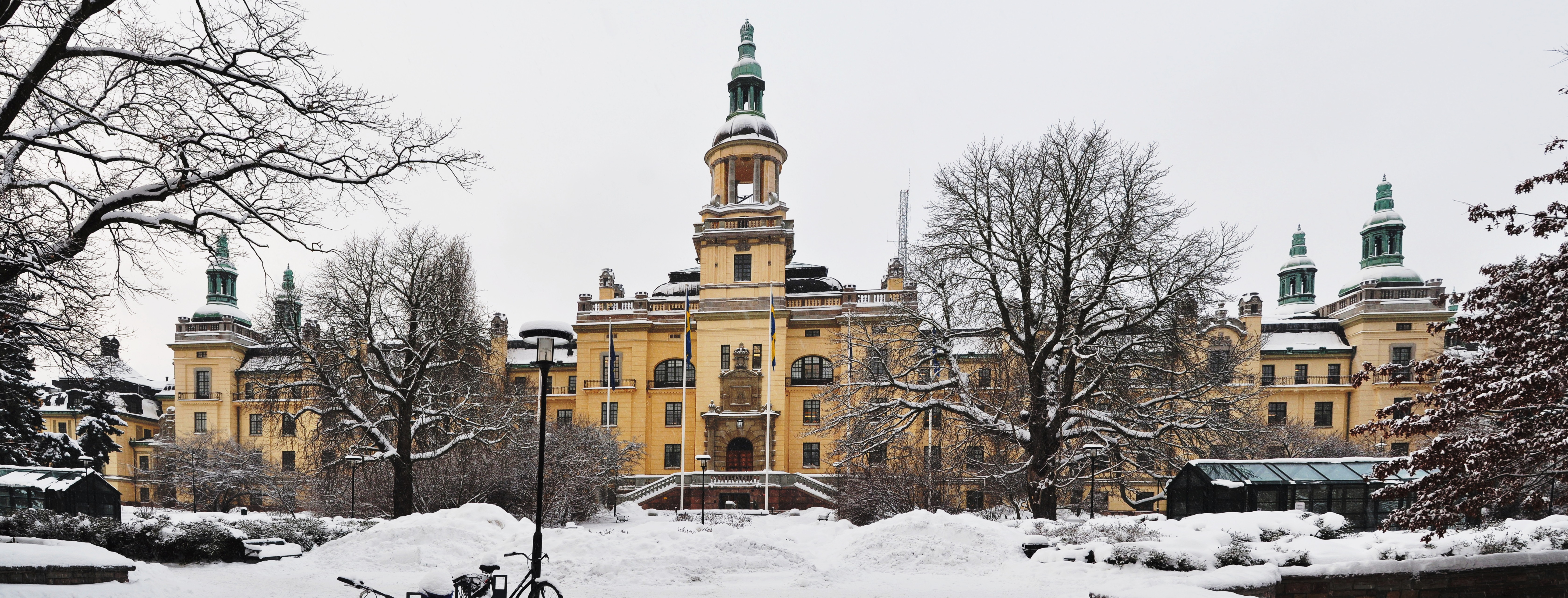 Stockholms Polishus 2011